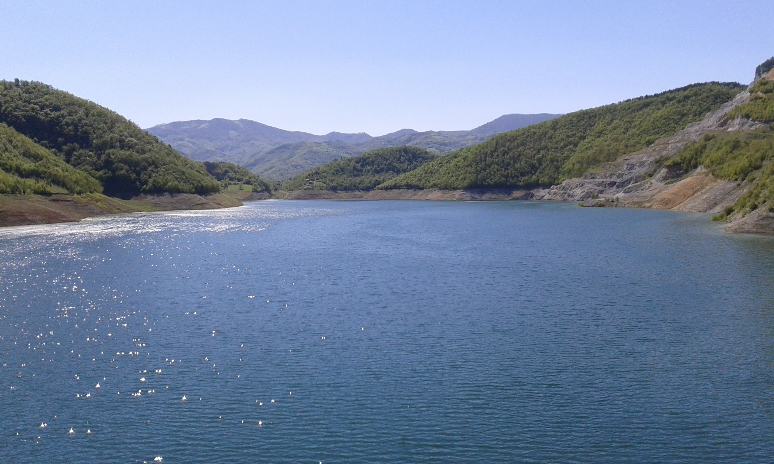 Ровни Језеро